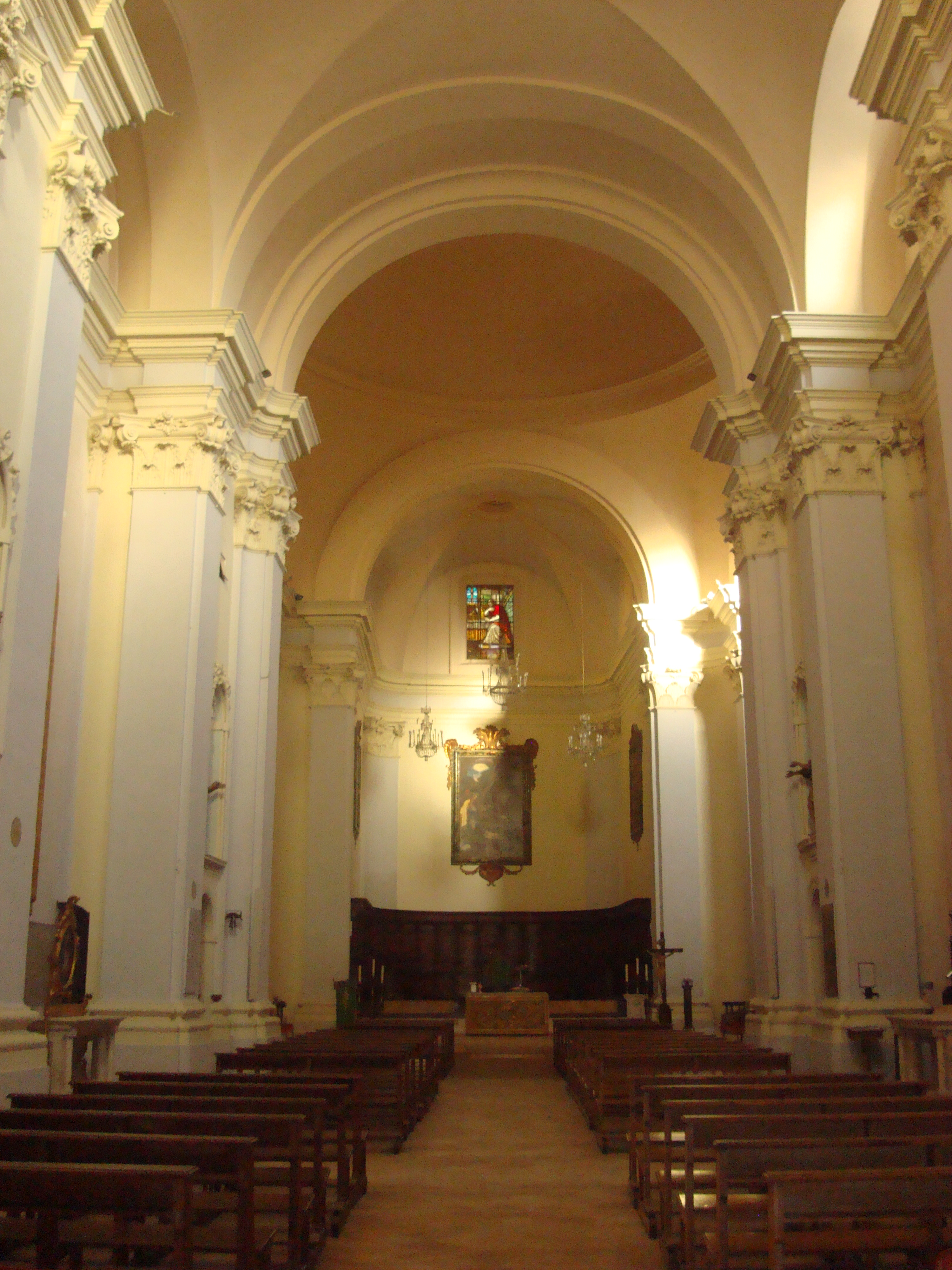 Interno chiesa Sant' Agostino a Fermo. AUTORE: Paolo Vitulli